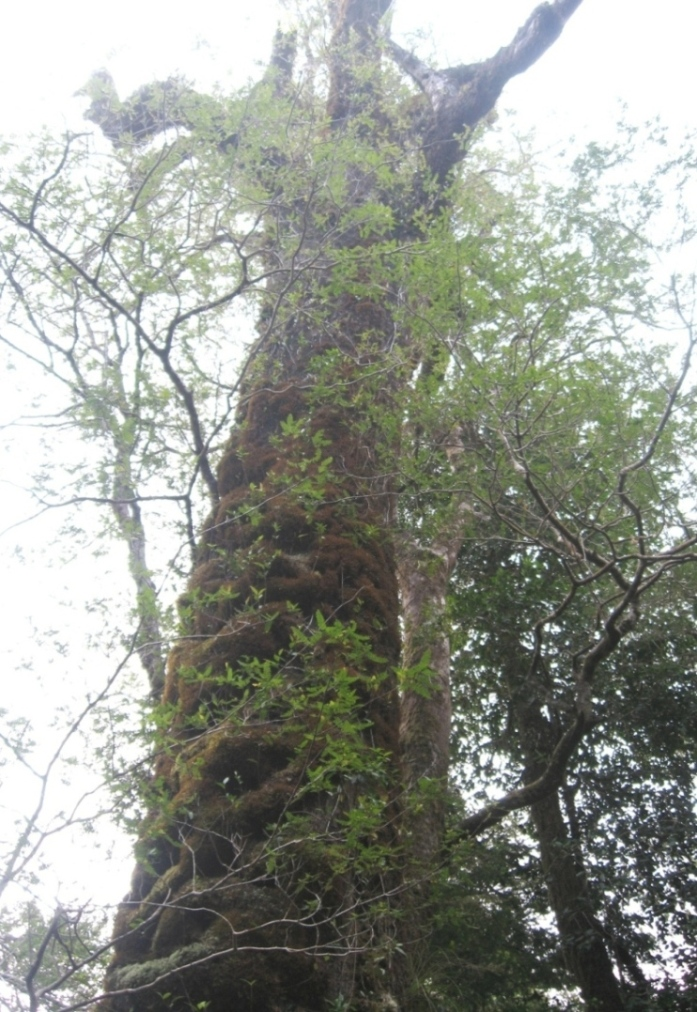 Tronco y copa del "Abuelo tineo", gran ejemplar de Weinmannia trichosperma en el parque Oncol, Valdivia, Chile.